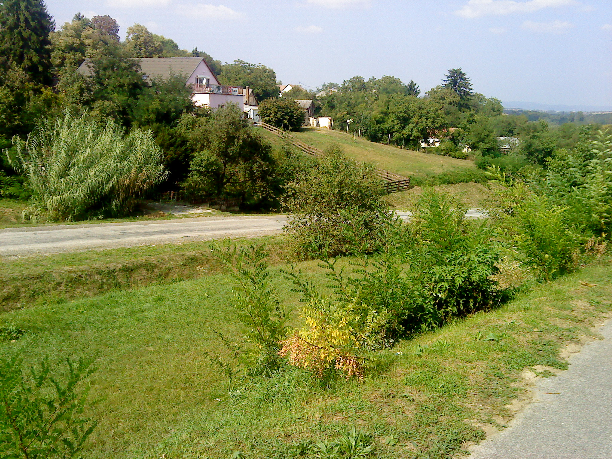 Szőkéd főútja